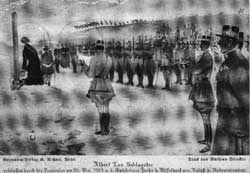 Esta é a imagem da execução do Mártir dos nacionais socialistas Albert Leo Schlageter que morreu há 83 anos, aos 29 anos, nas mãos da justiça Francesa.